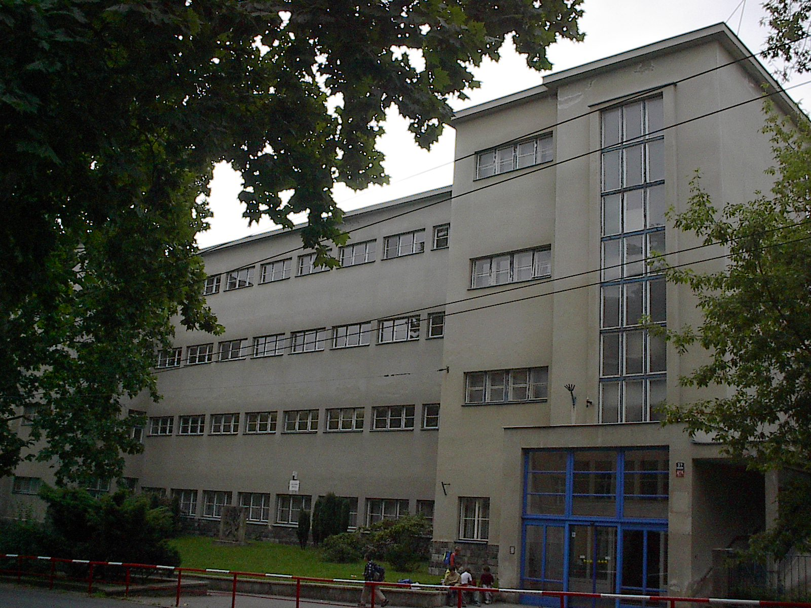 Josef Gočár - Menšinová škola občanská a obecná v Ústí n. L.